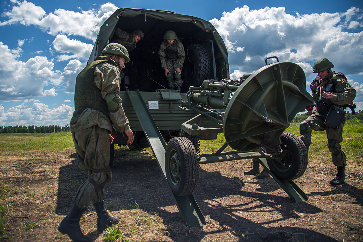 Открытие всеармейского этапа конкурса «Мастера артиллерийского огня» АрМИ-2017 (Саратовская обл.)